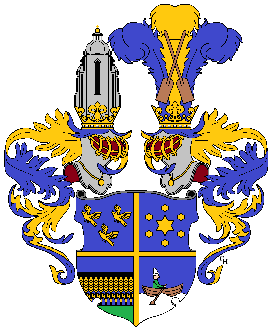 Wappen des böhmisch-österreichischen Malers Joseph Führich (1800–1876), verliehen anlässlich seiner Erhebung in den österreichischen Ritterstand 1861. Zeichnung von Gerd Hruška ( Für weitere Informationen zu dieser Standeserhebung siehe (